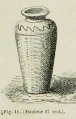 Vase gaulois trouvé entre Plounéventer et Ploudaniel (extrait de Rodolphe Pfnor, Ornementation usuelle de toutes les époques dans les arts industriels et en architecture, .... 1re année, 1866-1867